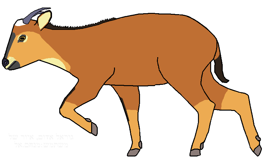 איור של גוראל אדום